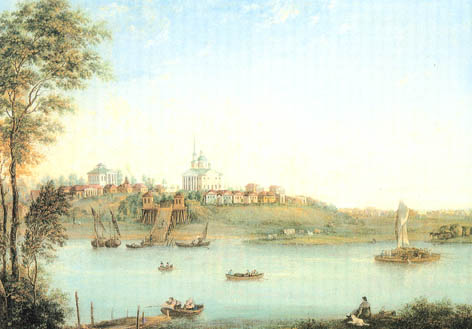 Виды села Грузино